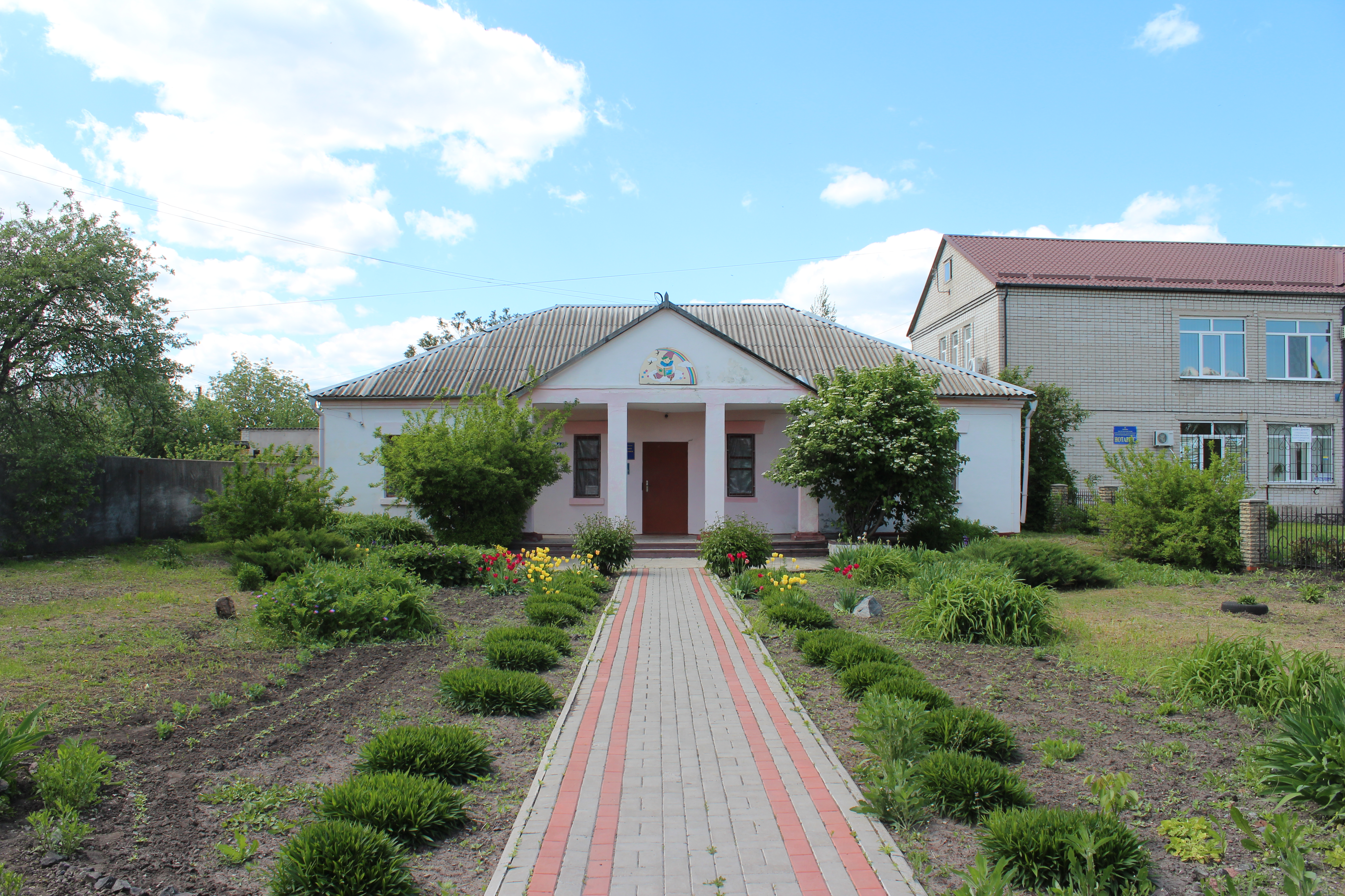 Новомосковська районна бібліотека для дітей